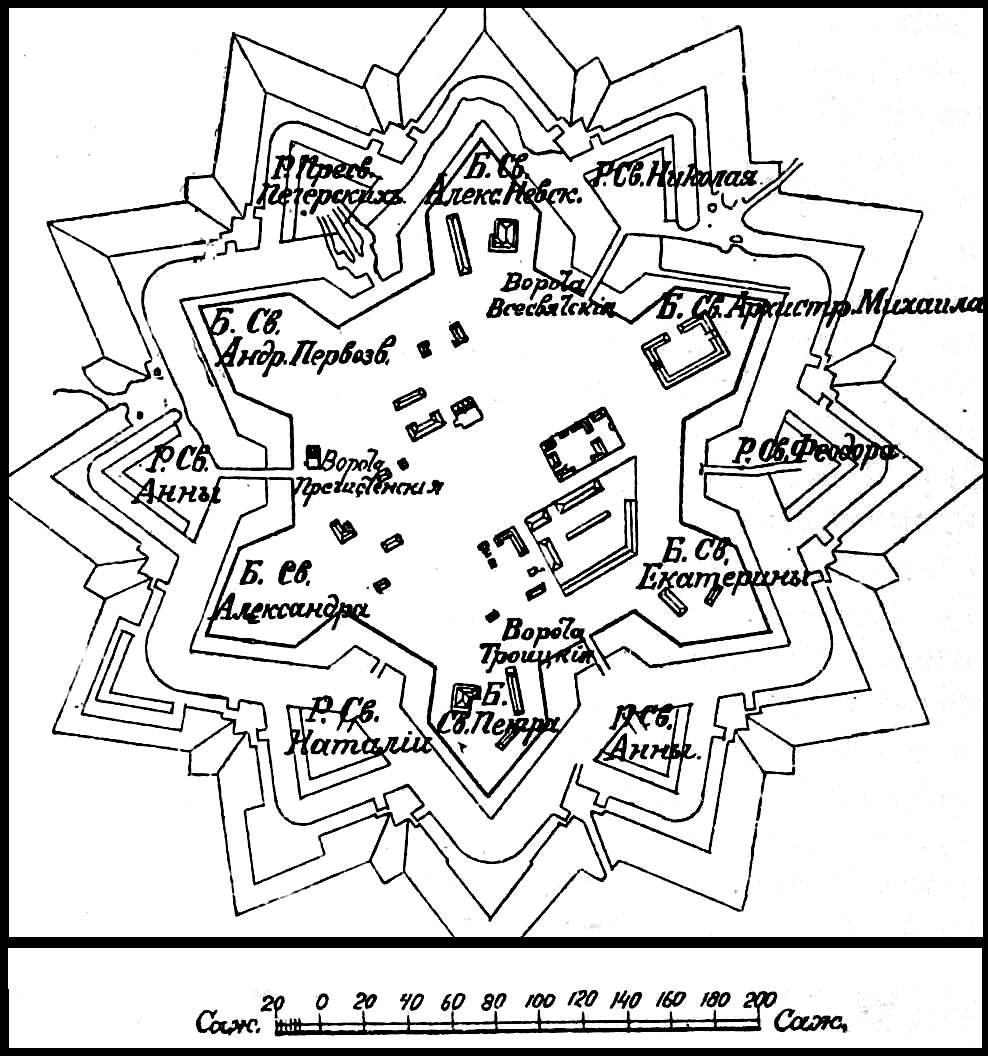 Это изображение было использовано для иллюстрирования статьи «Елисаветы Святой крепость» опубликованной в десятом томе «Военной энциклопедии», который был издан книгоиздательским товариществом И. Д. Сытина в 1912—1913 гг. в столице Российской империи городе Санкт-Петербурге.